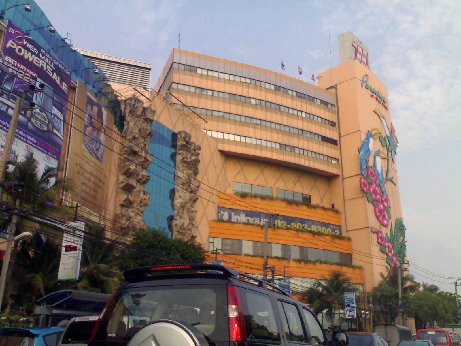 The Mall Bangkae